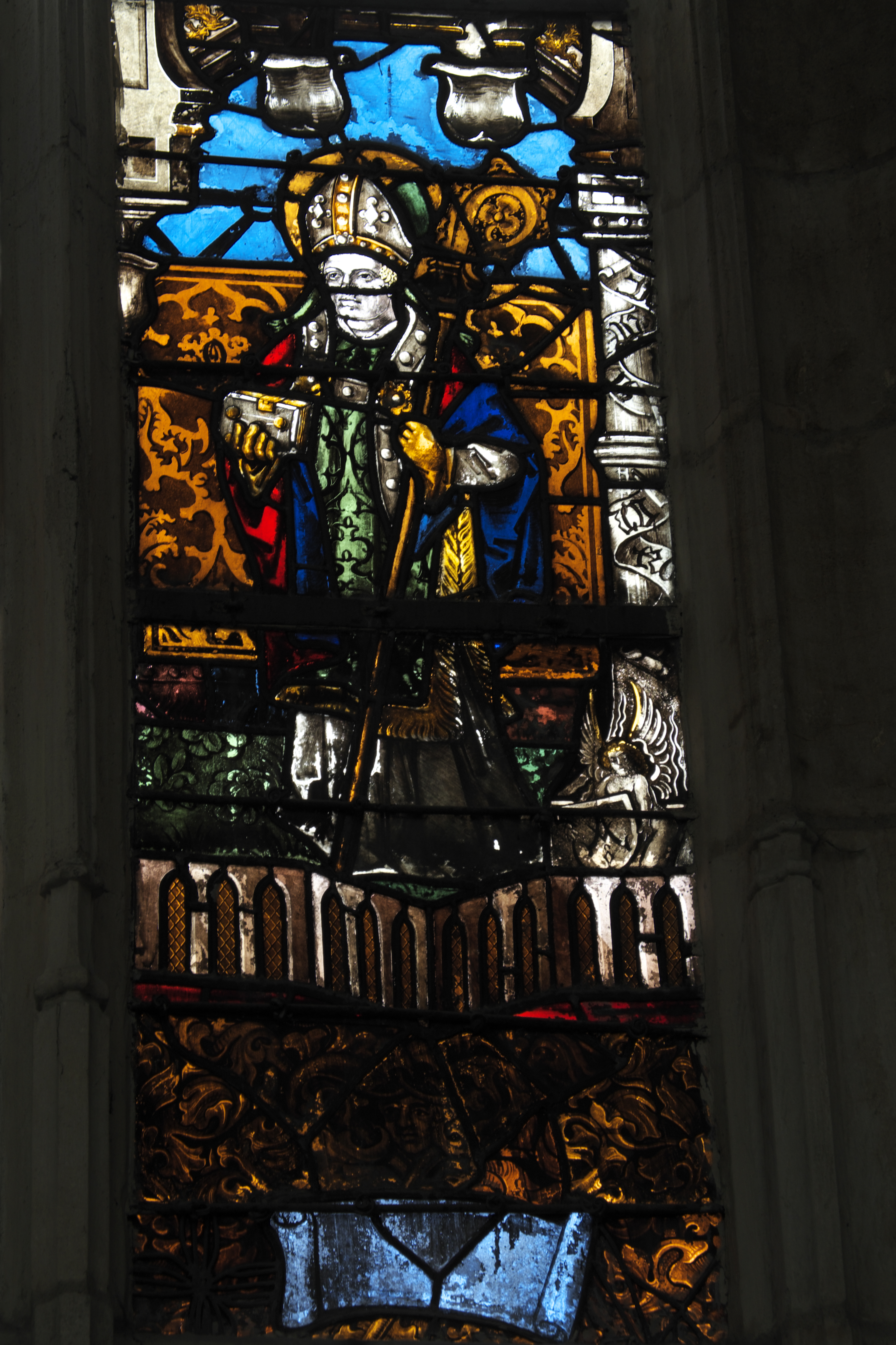 Bleiglasfenster (Baie 24) in der Basilika Saint-Nicolas in Saint-Nicolas-de-Port im Département Meurthe-et-Moselle (Lothringen/Frankreich), aus einer lothringer Werkstatt, um 1518; Darstellung: Bischof